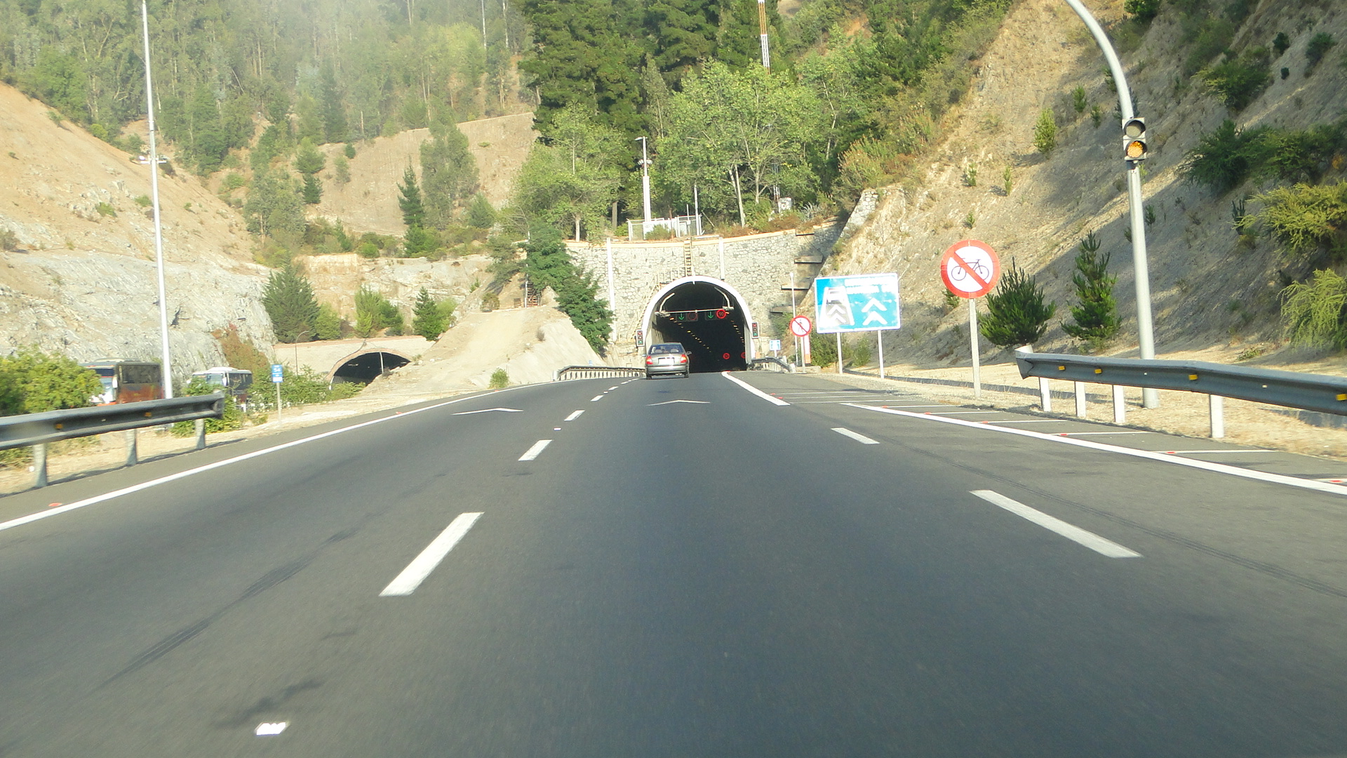 Tunel Zapata carretera Santiago Viña Valparaiso